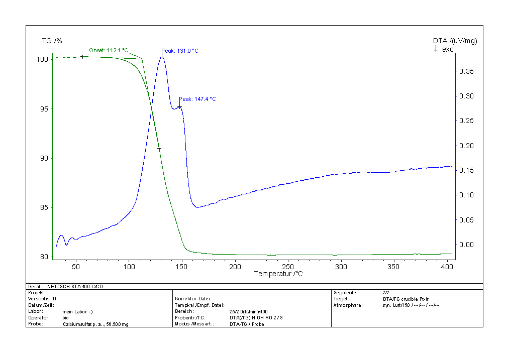 Kristallwasserabspaltung von CaSO4 in der DTA